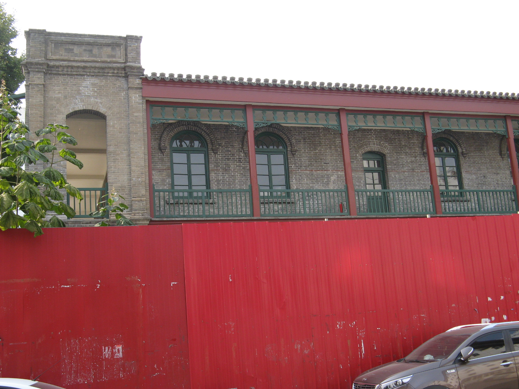 中国河北省保定市直隶审判厅旧址